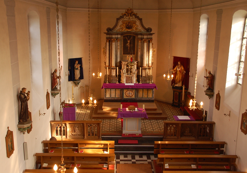 St. Medarduskirche in Bergheim-Auenheim